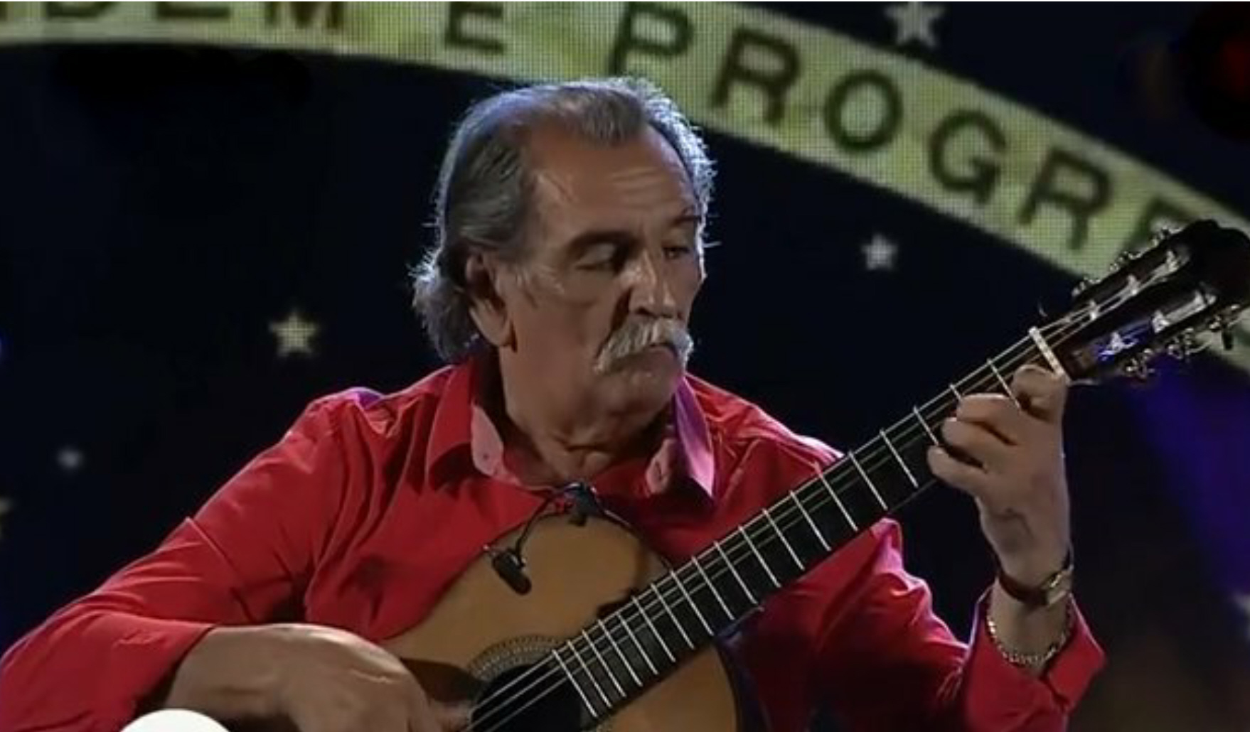 Lúcio Yanel representando a Brasil en la Fiesta Nacional del Chamamé 2016